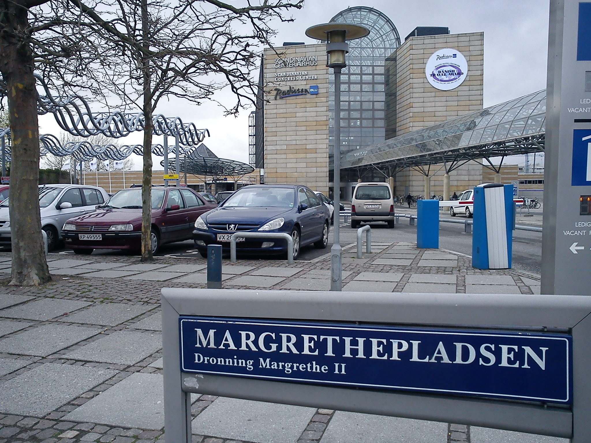 Margrethepladsen ved Scandinavian Center Aarhus.